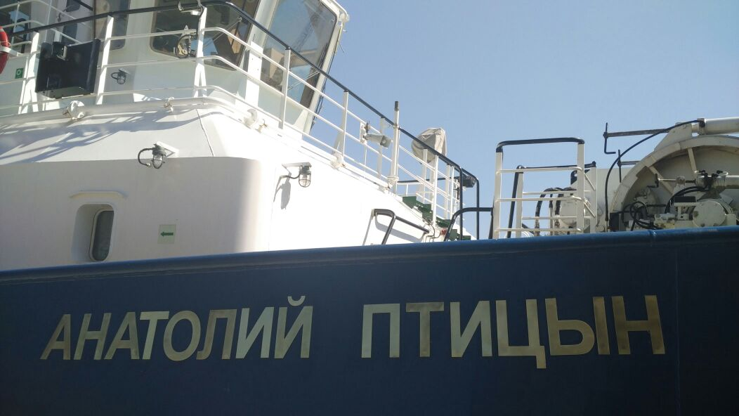 Буксир "МБ-97" названный в честь Анатолия Птицына, фотография сделана летом 2017 года, г. Балтийск